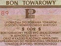 Bon towarowy - istotna jest treść wydrukowana na tym bonie "Upoważnia do pobrania towarów eksportu wewnętrznego"